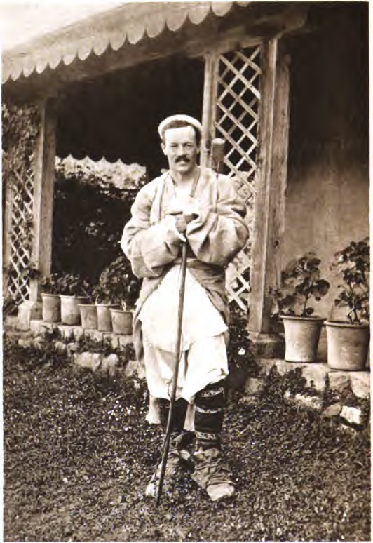 Чарльз Гранвиль Брюс. Фото автора из книги